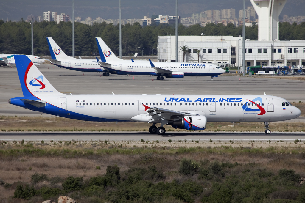 Antalya